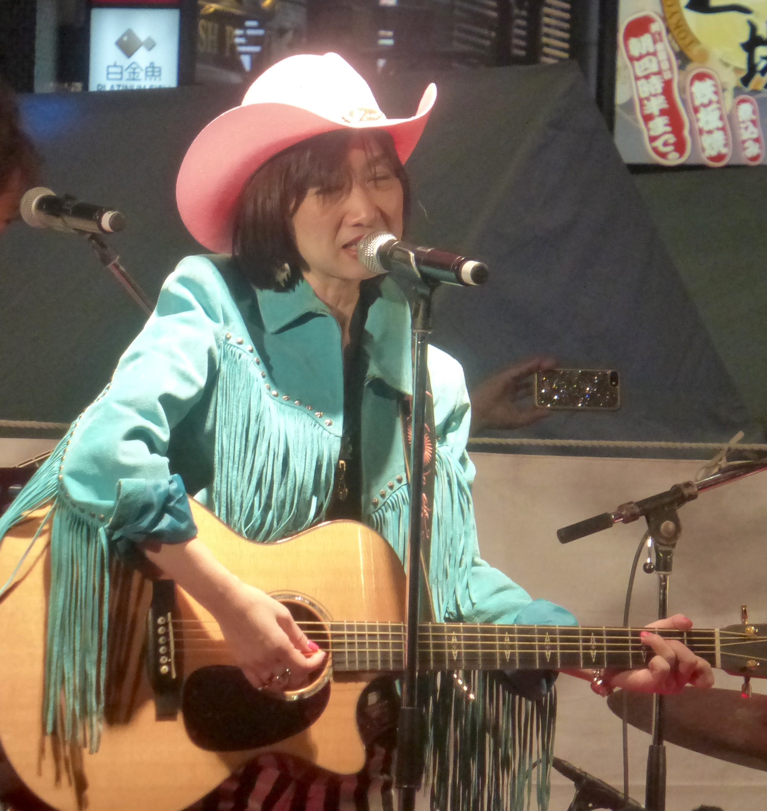 山下 直子（やました なおこ、Naoko Yamashita)